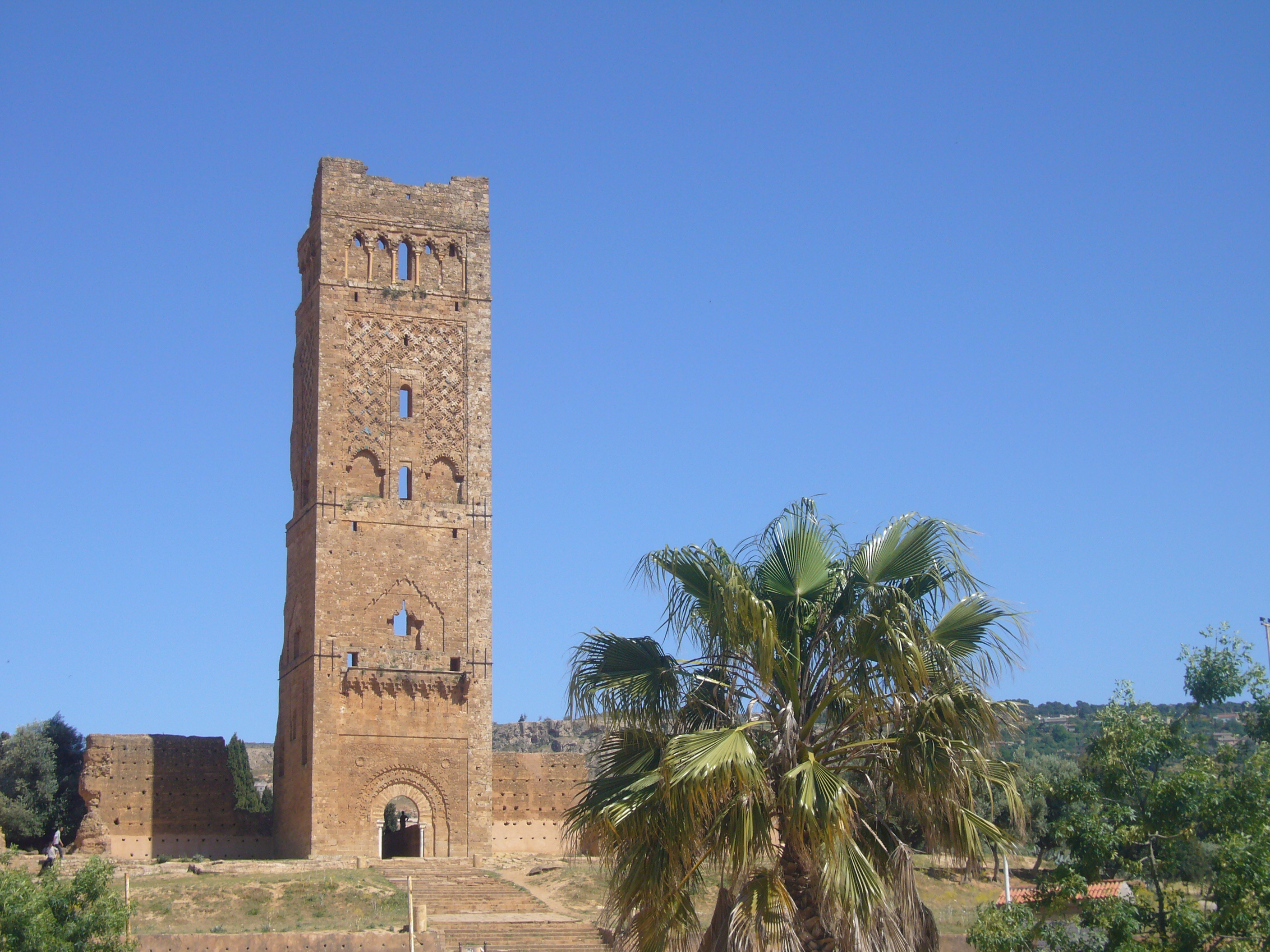 Minaret des ruines de Mansourah (Tlemcen Algérie)